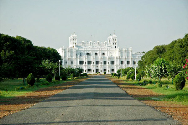 JaiVilas Palace Gwalior